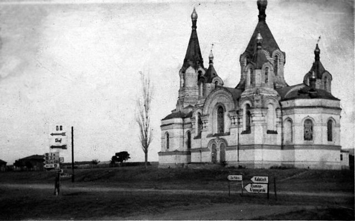 Сталинградская область, станица Голубинская, Николаевская церковь (1942 год).